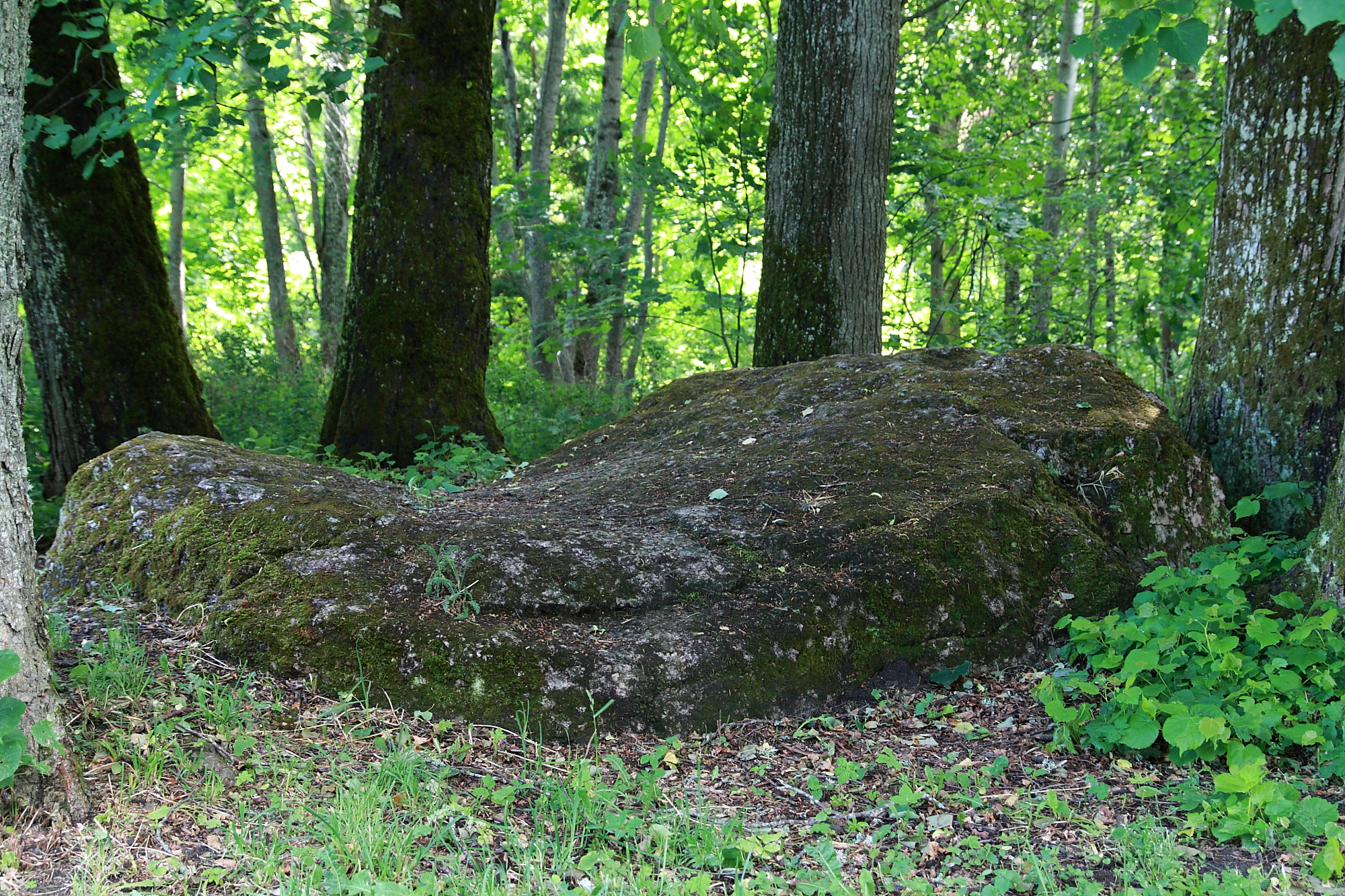 Keila Jõepargi kultusekivi, Orjakivi